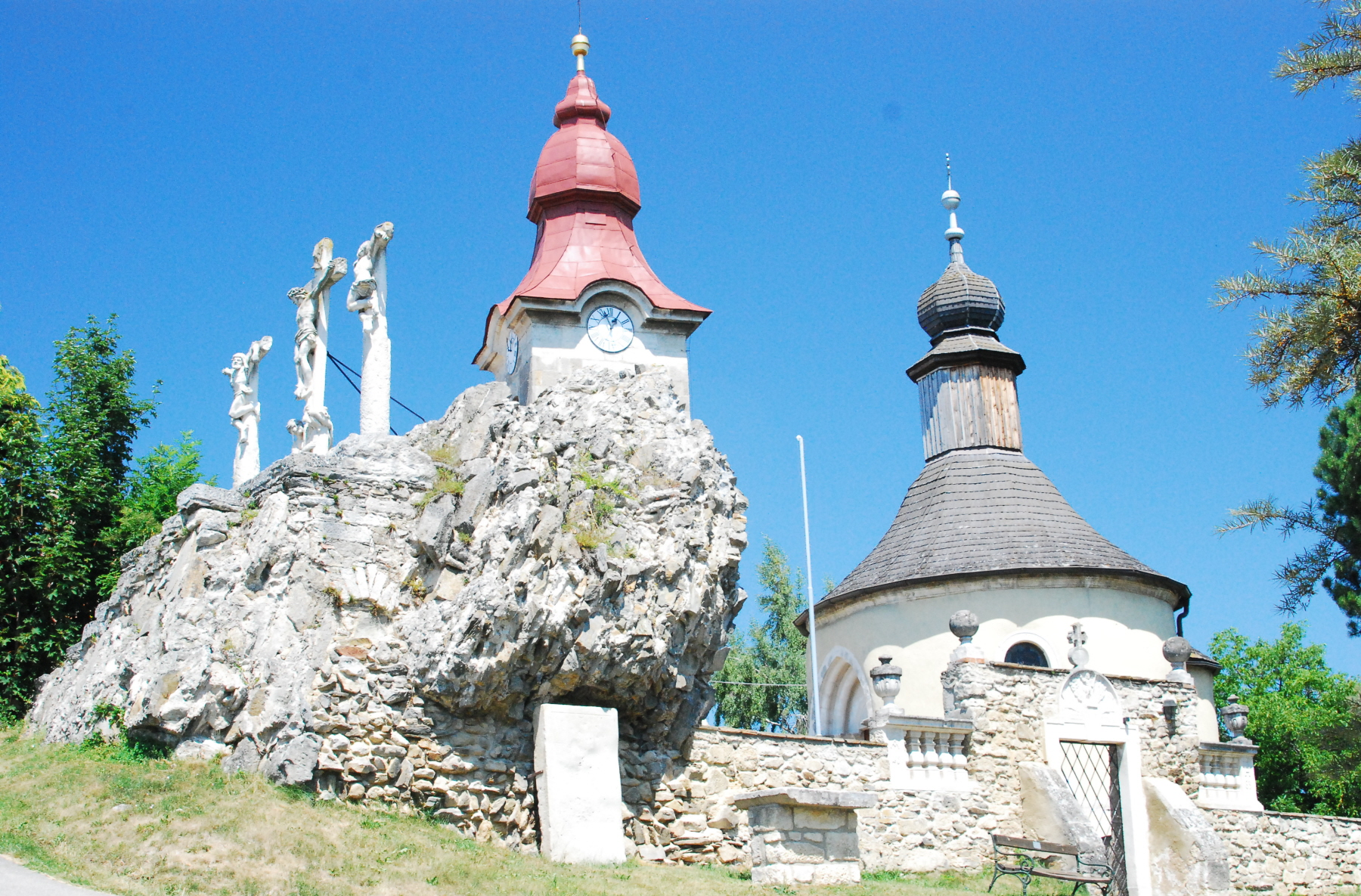 Kalvarienberg, Kirche und Karner von Kühnring in Niederösterreich